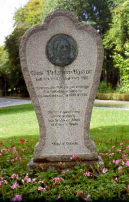 Mindesmærke for Niels Pedersen-Nyskov ved Vesterport i Grenaa med portrætmedaljon, udført af Charles Arvesen